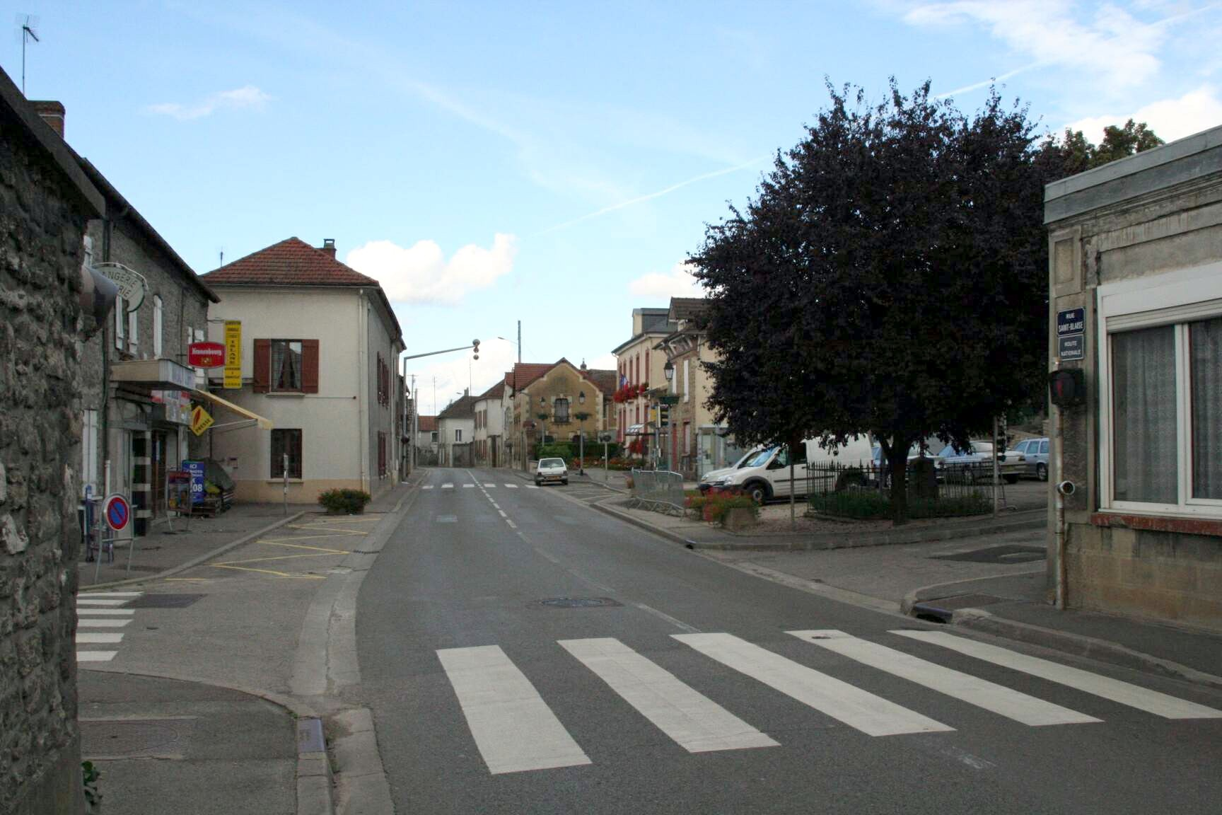 rue principale de Nézel - Yvelines (France)